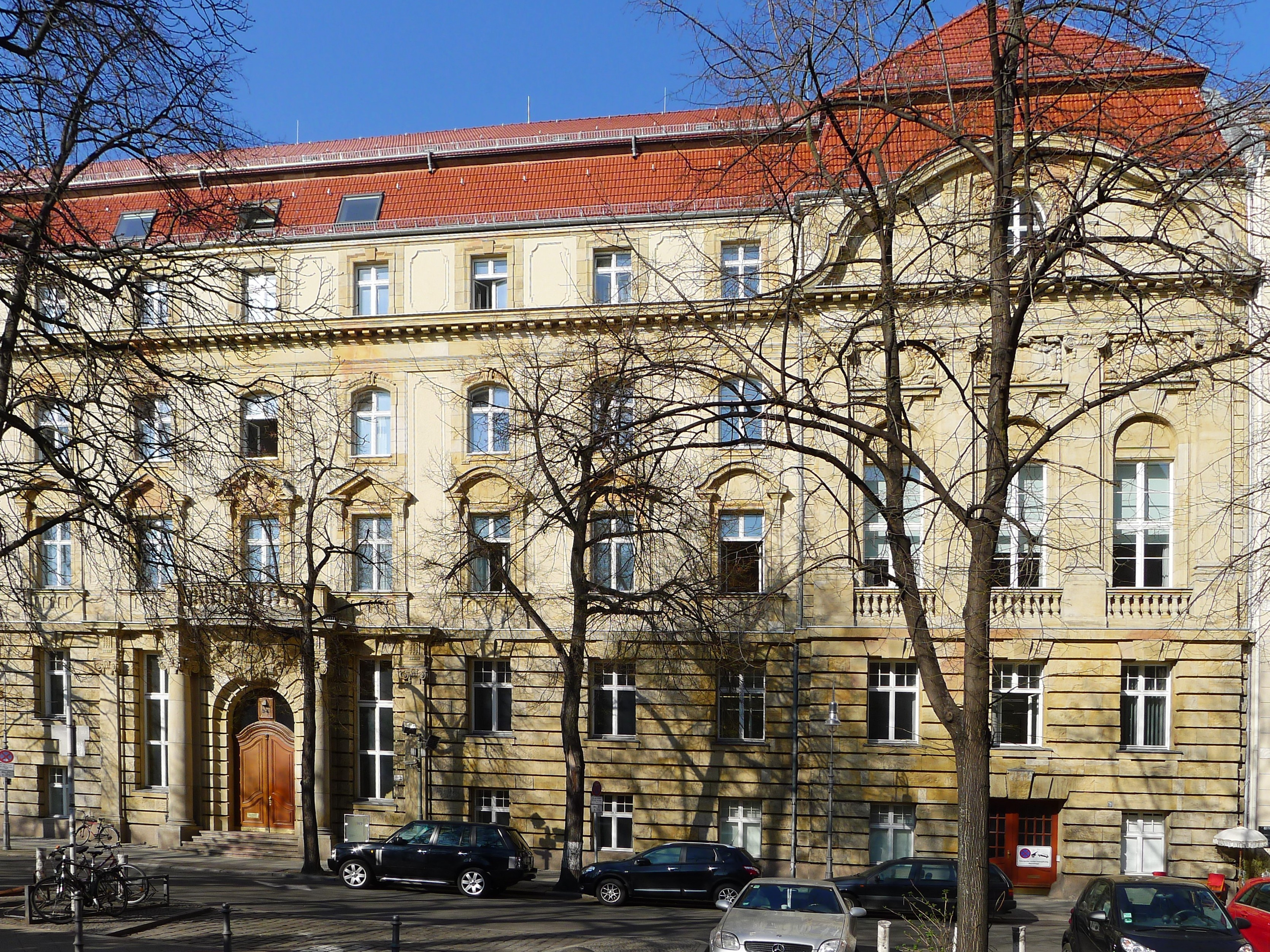 Verwaltungsgebäude